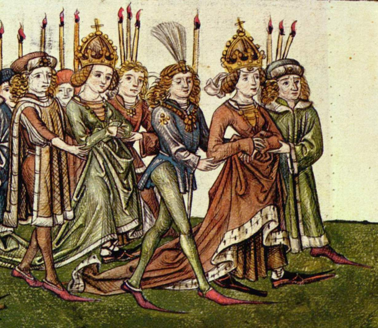 Königin Barbara, rechts und ihre Tochter, Königin Elisabeth von Luxemburg (Frau von Albrecht II. (HRR), links) auf dem Zug ins Münster Barbara of Cilli